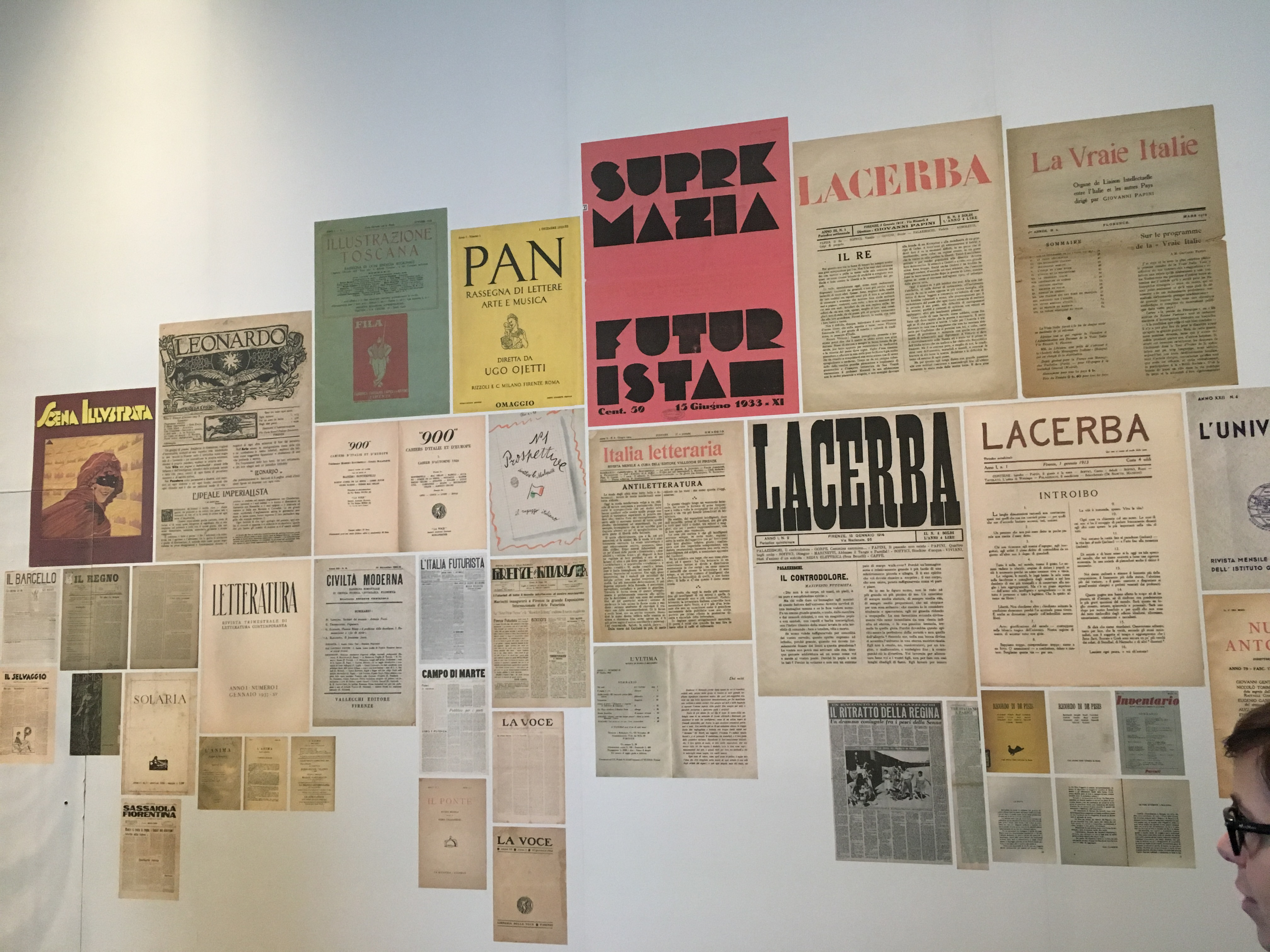 Principali testate delle riviste letterarie fiorentine